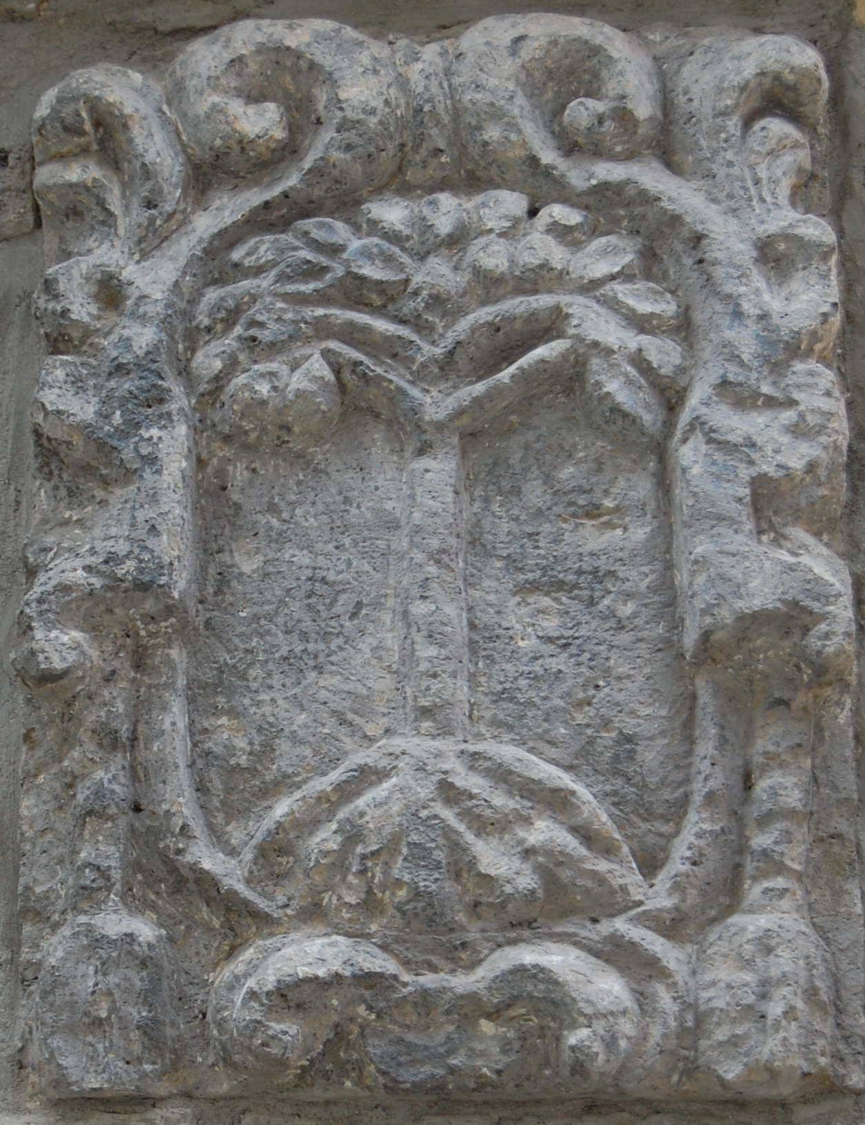 Stemma della città di Nocera de' Pagani scolpito sulla facciata della Chiesa del Corpo di Cristo di Nocera Inferiore